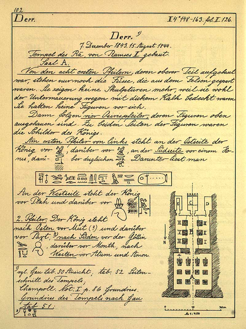 Text zum Felsentempel von Derr, Ägypten